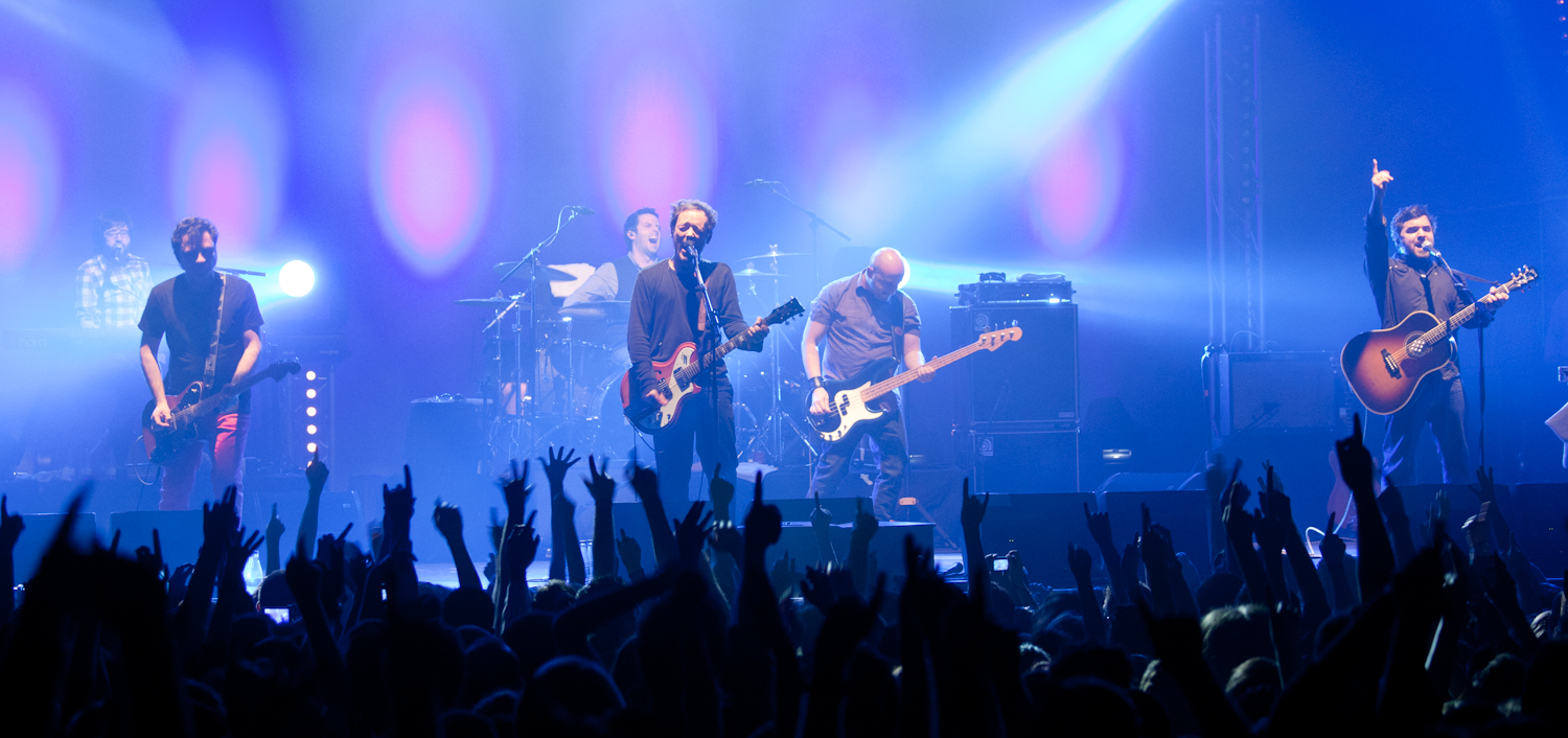 Love of Lesbian - Razzmatazz